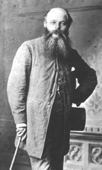 Friedrich Stummel, deutscher Kirchenmaler